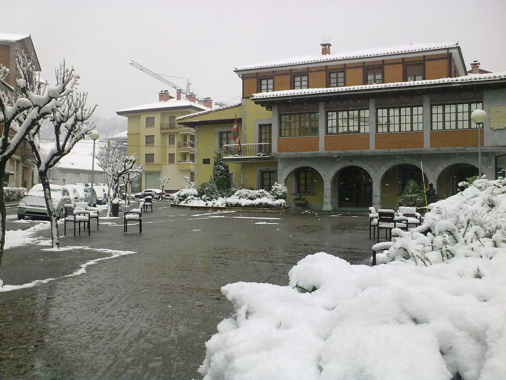 El ayuntamiento bajo la nieve